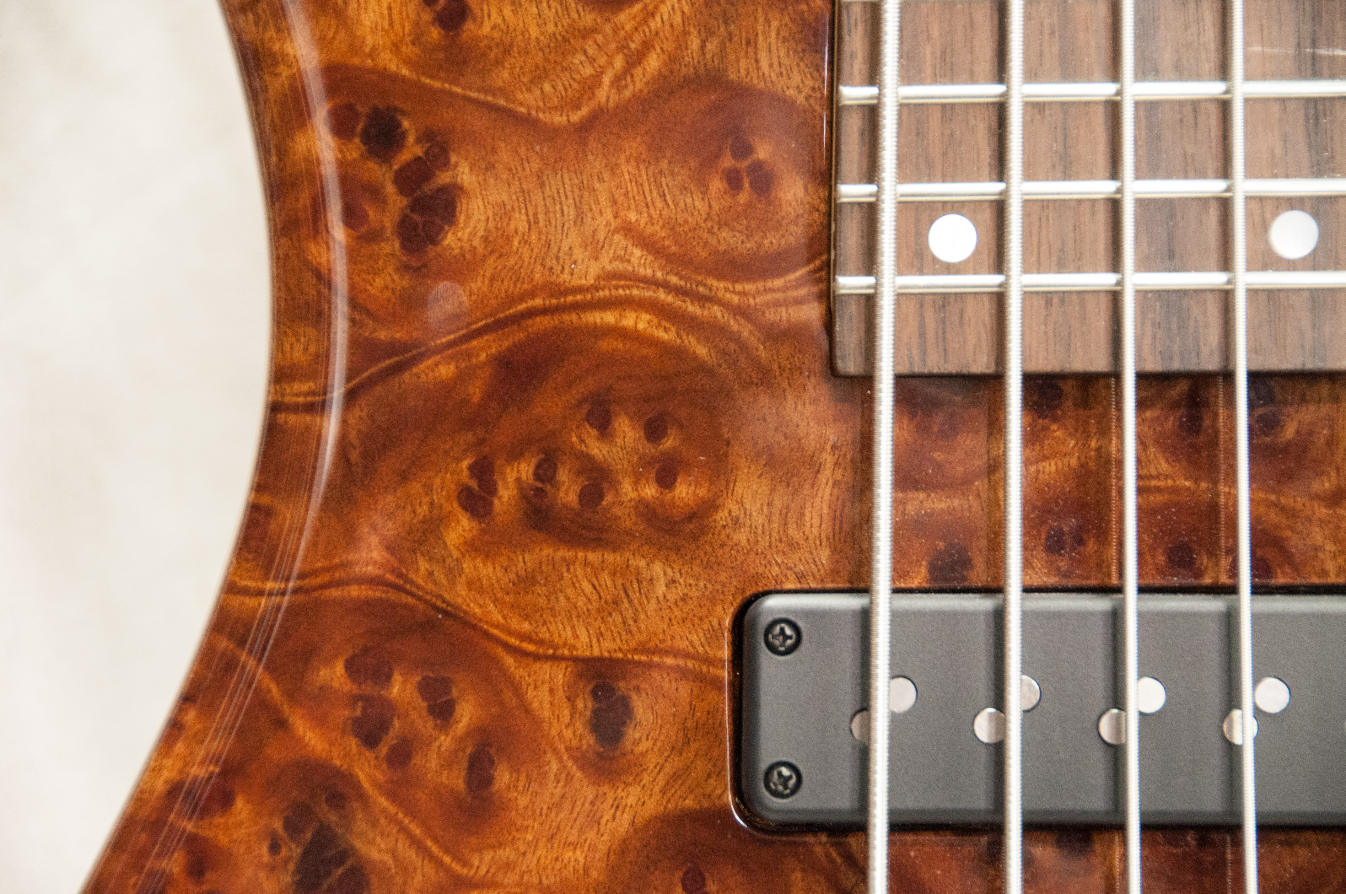 ART_0027